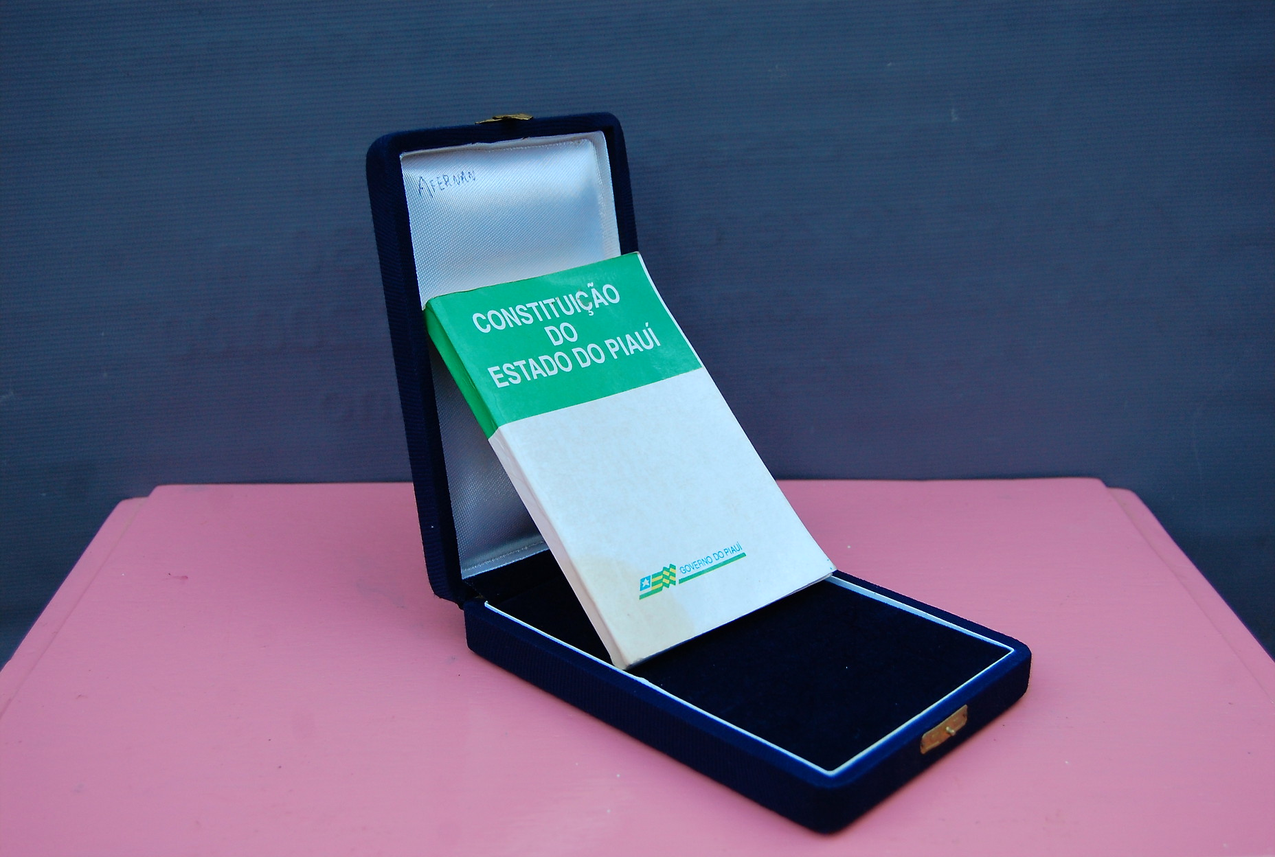 Estojo com a Constituição política do estado do Piauí de 1989. O estojo pertence a autoria desta imagem.